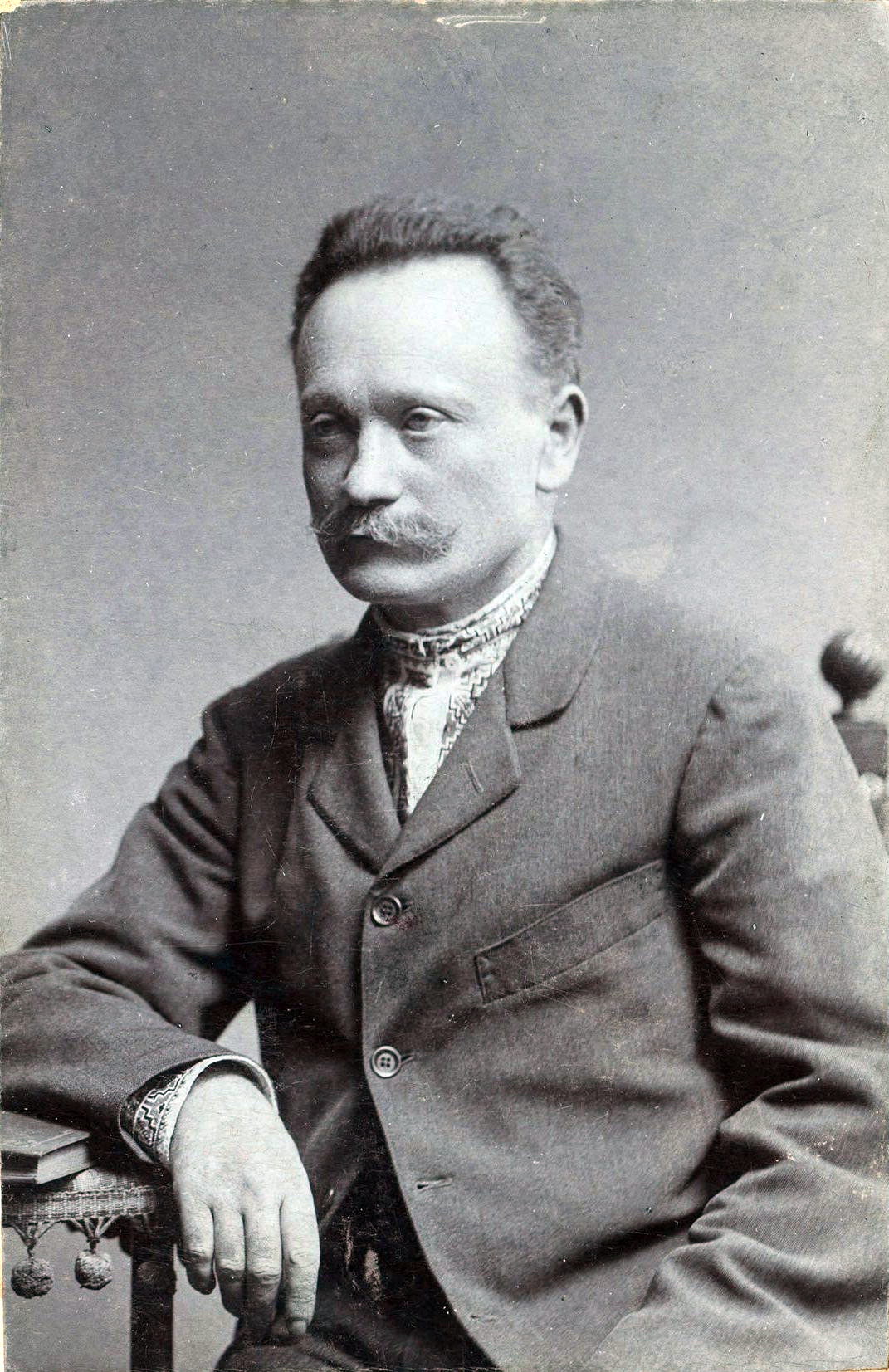 Іван Якович Франко (27 серпня 1856 — 28 травня 1916) — видатний український письменник, поет, публіцист, перекладач, учений, громадський і політичний діяч. Доктор філософії (1893), дійсний член Наукового товариства імені Шевченка (1899), почесний доктор Харківського університету (1906).